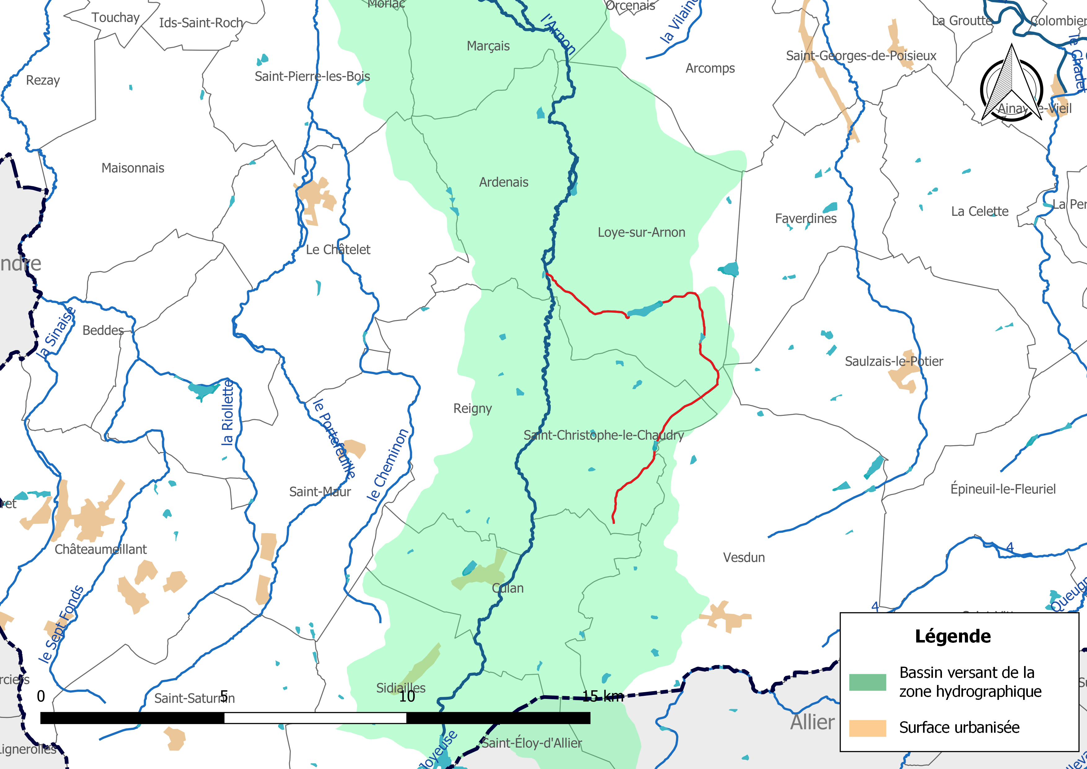 Carte du cours d'eau « Étang de la Charnaie » (France) et de la zone hydrographique dans laquelle il s'insère.